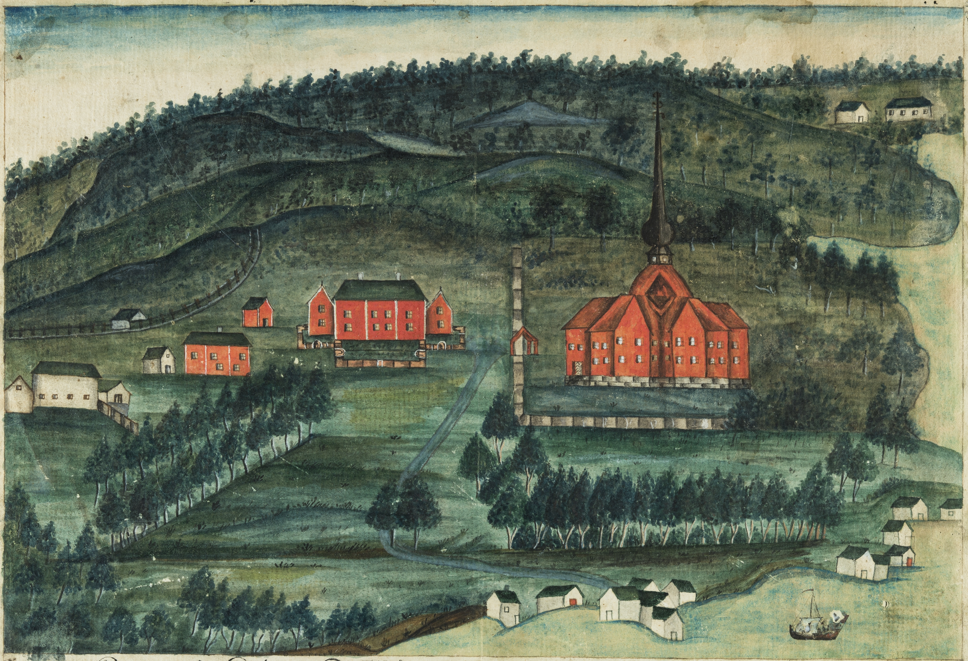 Dolstad prestegård og kirke i Vefsn, Nordland av Nikolayus Silliseth. Akvarell i brun treramme med glass. Innskrift:Påskrift: Prospect Af Bolstad Prestgaard m.m. Påskrift: Tegnet af Nikolayus Silliseth den 24. Febr. 1823 Fra utstillingen "1814 – Spillet om Danmark og Norge" ved Norsk Folkemuseum 14. jan 2014 — 31. jul 2014.